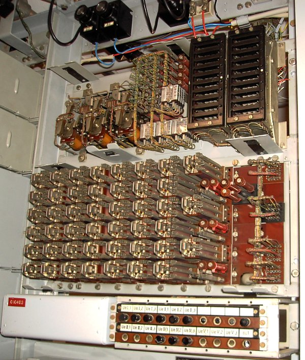 Wählsternübertragung in einer Vermittlungsstelle Type: WSTUe 53